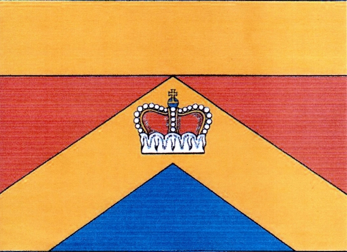 vlajka,Krásné , okres Žďár nad Sázavou